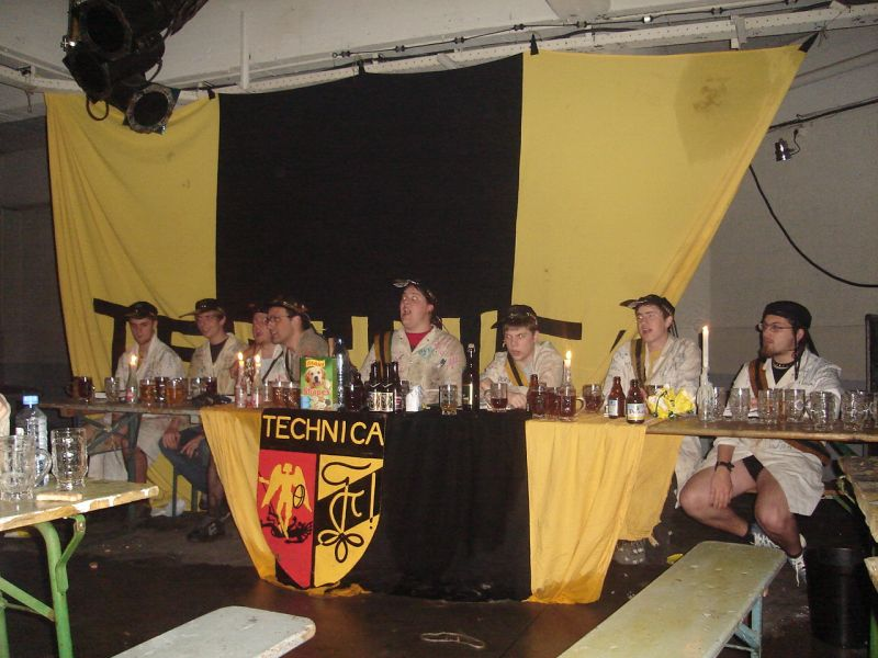 Cantus van studentenkring Technica, te Brussel.